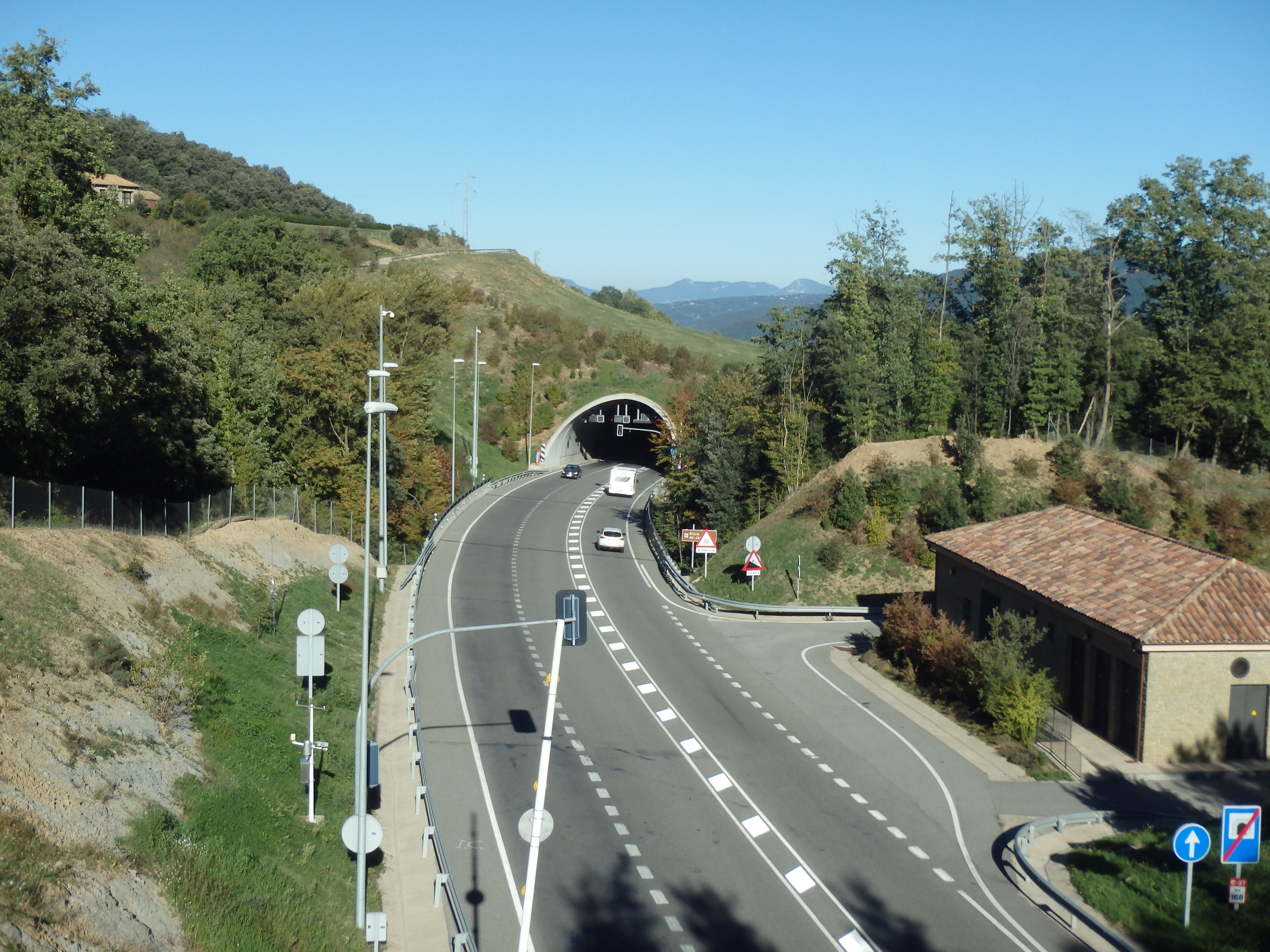 Túnel de la Carrera, a la C-37 dins del terme municipal de la Vall d'en Bas, a la Garrotxa.